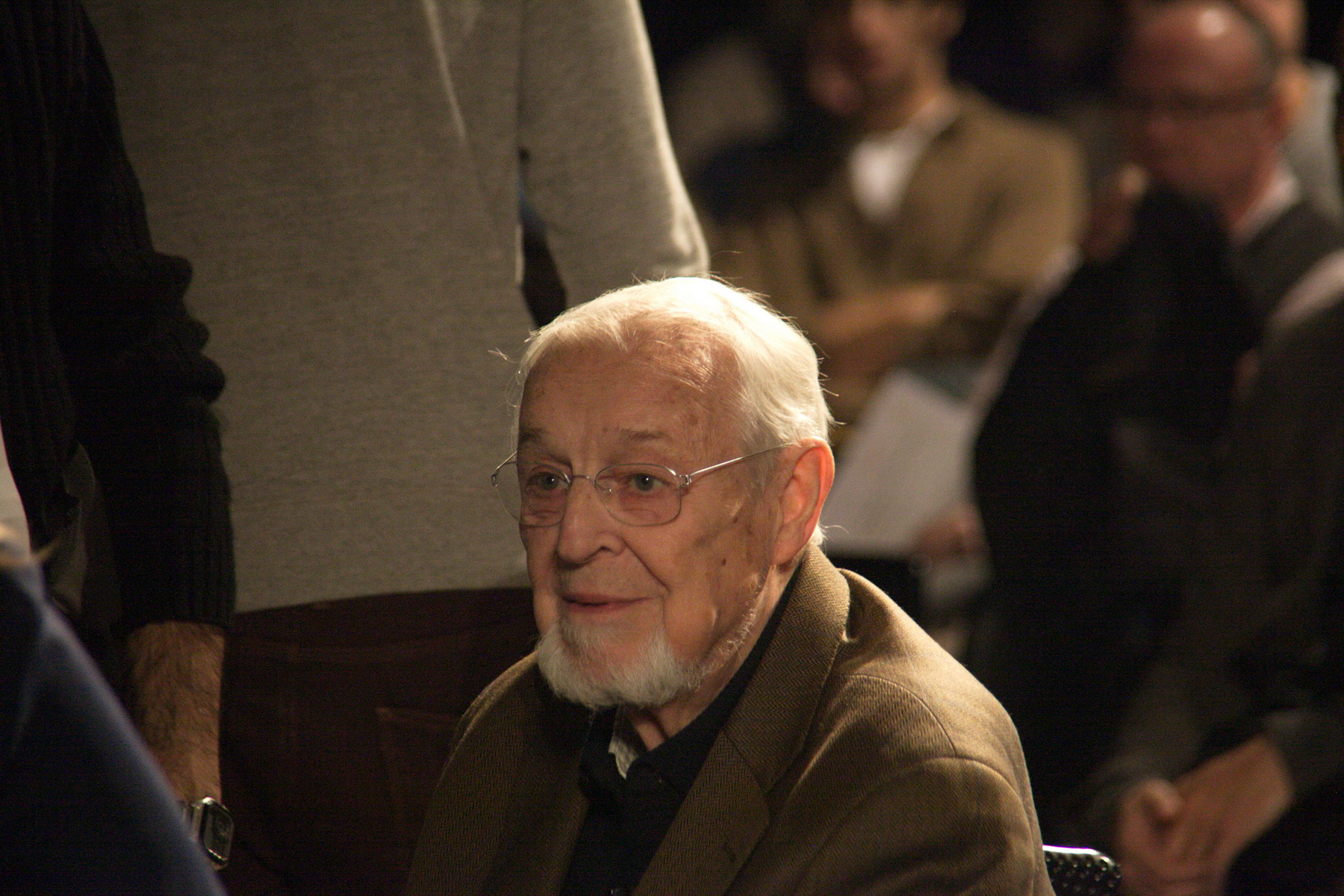 Jordi Carbonell, durant l'acte de presentació de la candidatura d'Alfred Bosch a l'Alcaldia de Barcelona. Cotxeres de Sants, 11-12-2014